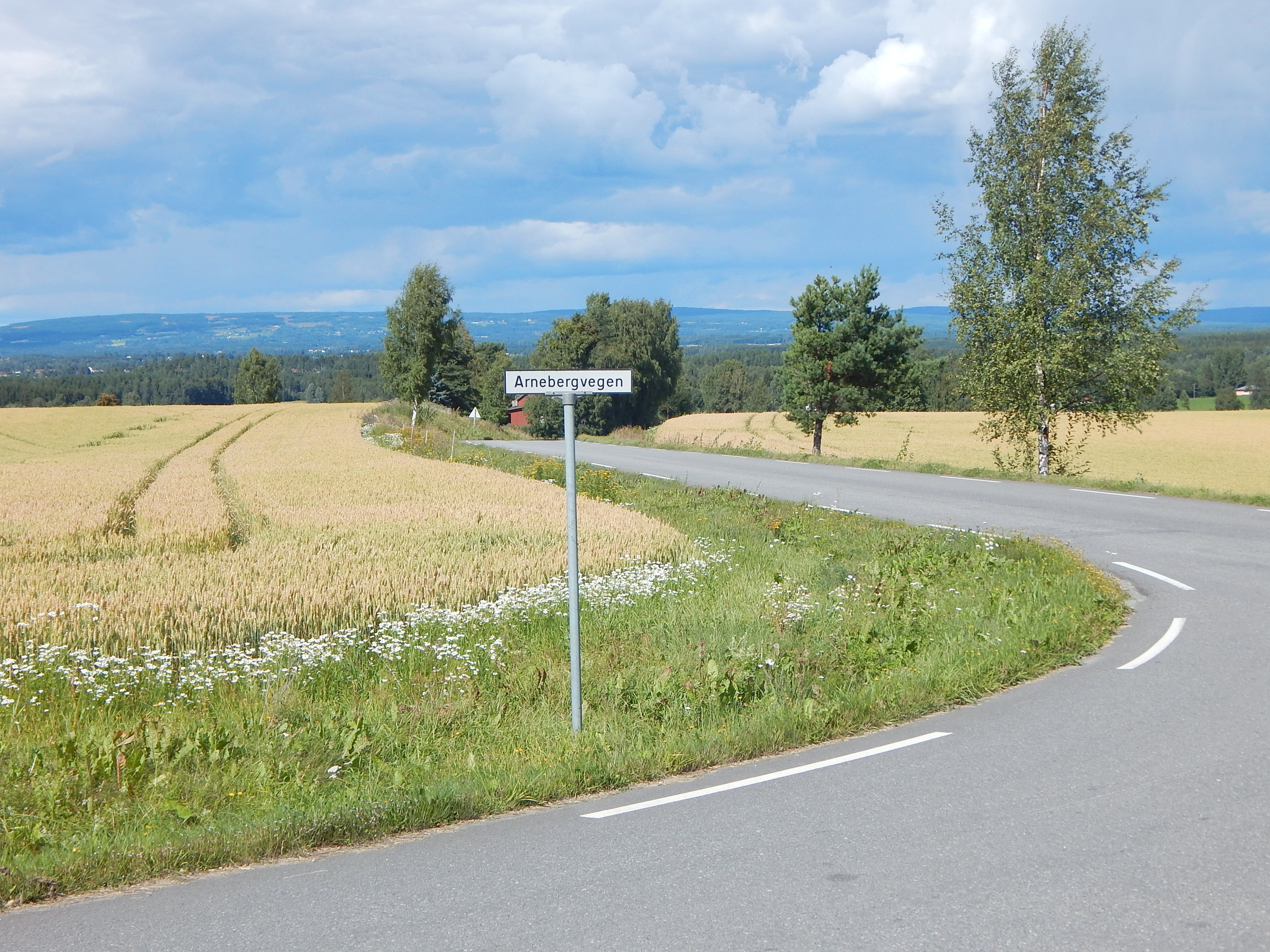 Veikryss mellom Arnebergveien (fylkesvei 1858, tidl. 195, t.v.) og Jønsbergvegen (fylkesvei 1908, tidl. 235, innover i bildet). Arneberggårdene ligger på et høydedrag bak fotografen.